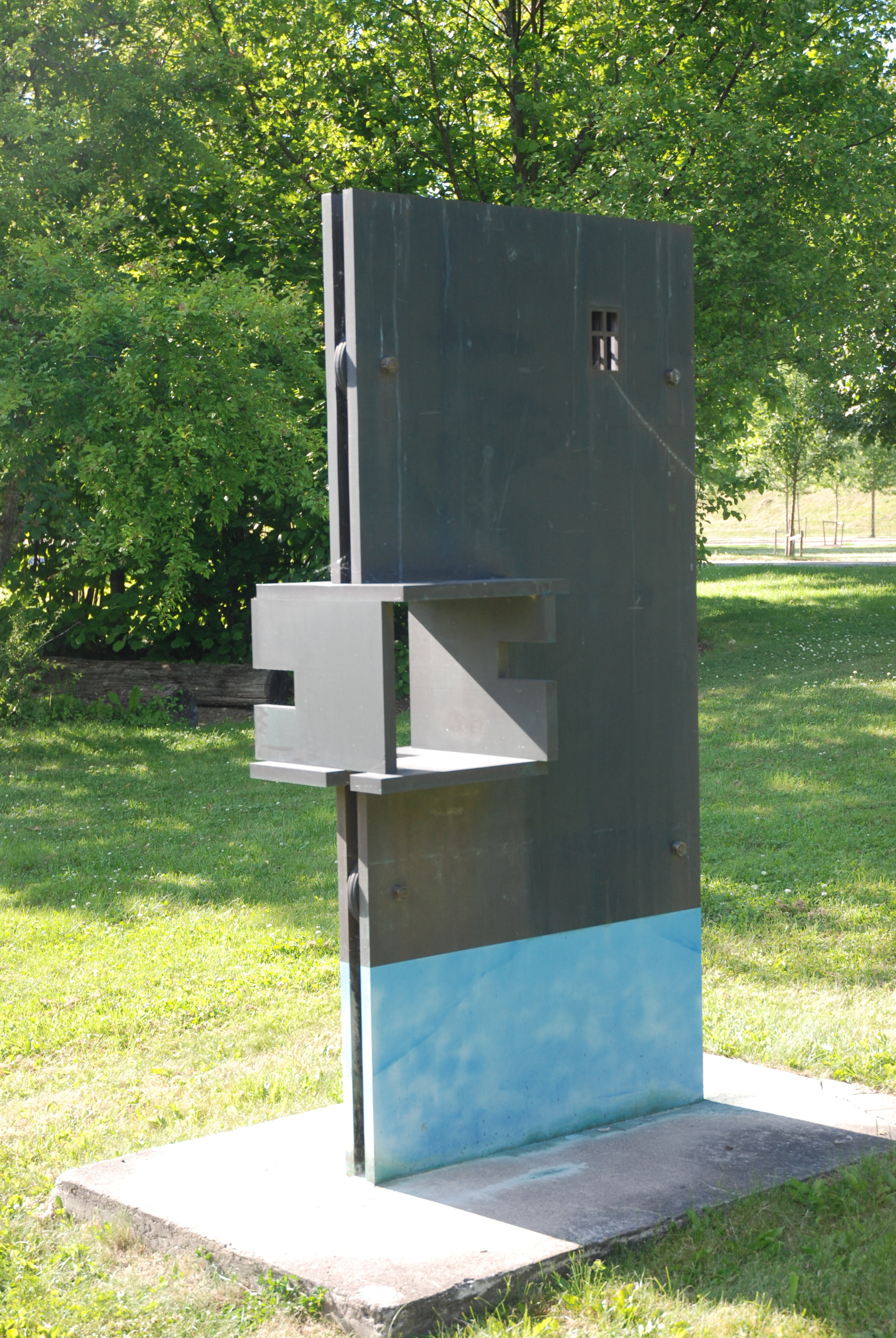 Elle Klarskov Jörgensen' s Den vertikala tiden (The vertical time), Linköping University, Sweden